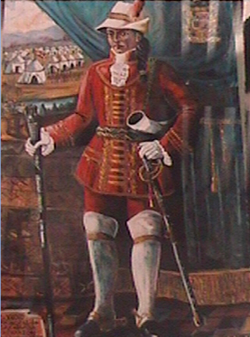 El Kuraka de la Hacienda de Sacabamba.